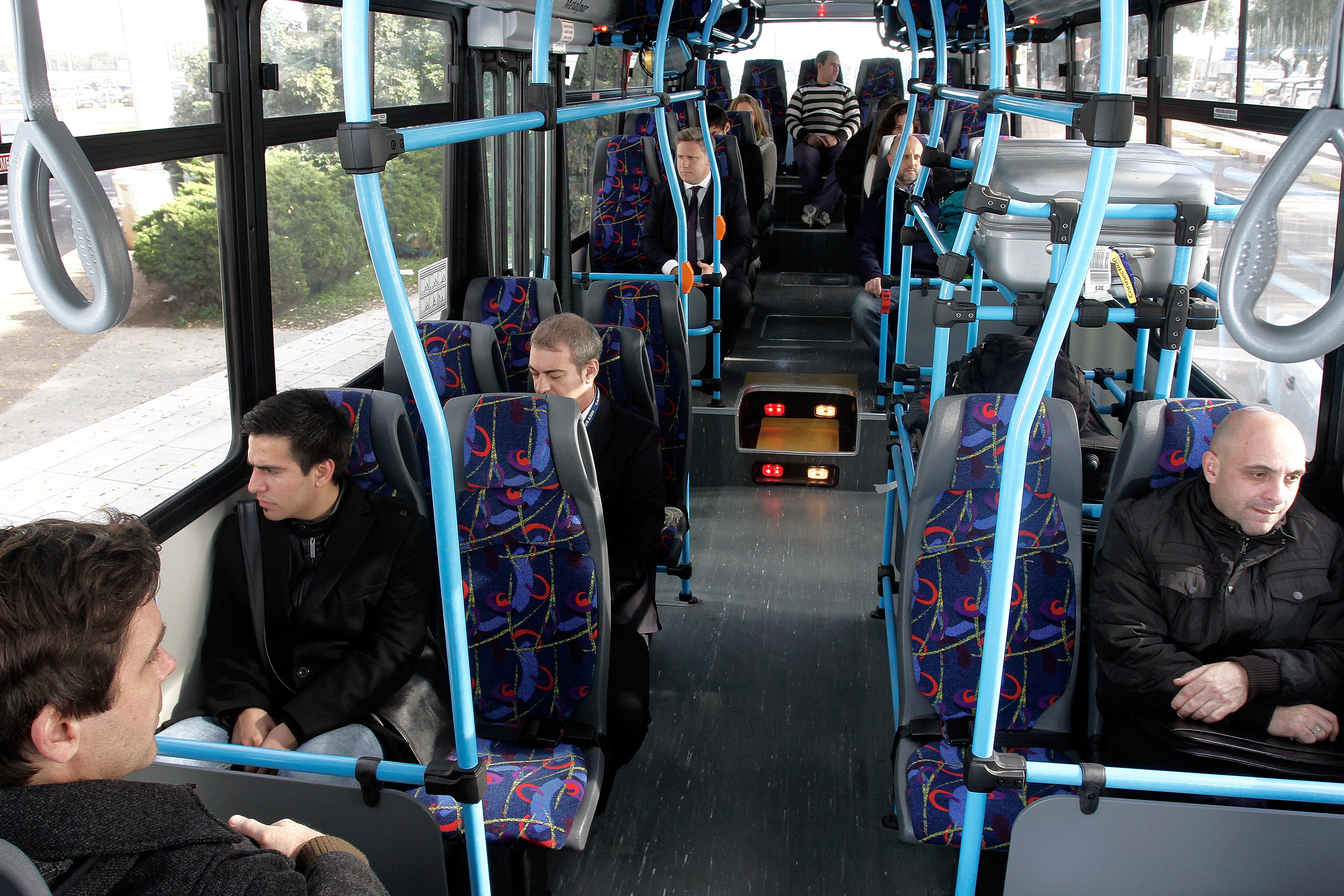 Interior del micro - ArBus. Servicio de transporte terrestre para pasajeros y empleados del Aeroparque Jorge Newbery